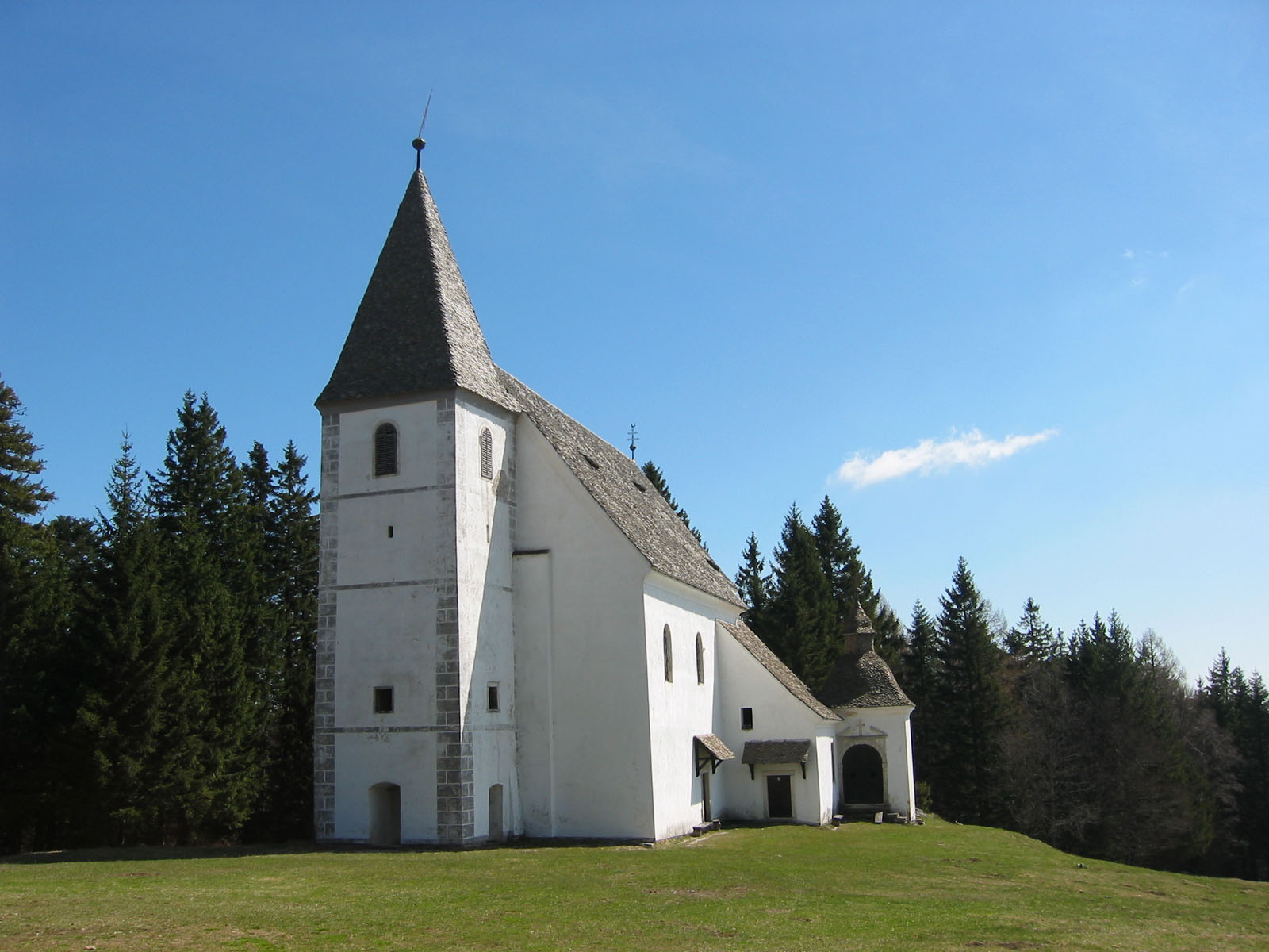 Cerkev na Arehu, Pohorje, Slovenija Foto Andrejj, 29 April 2005